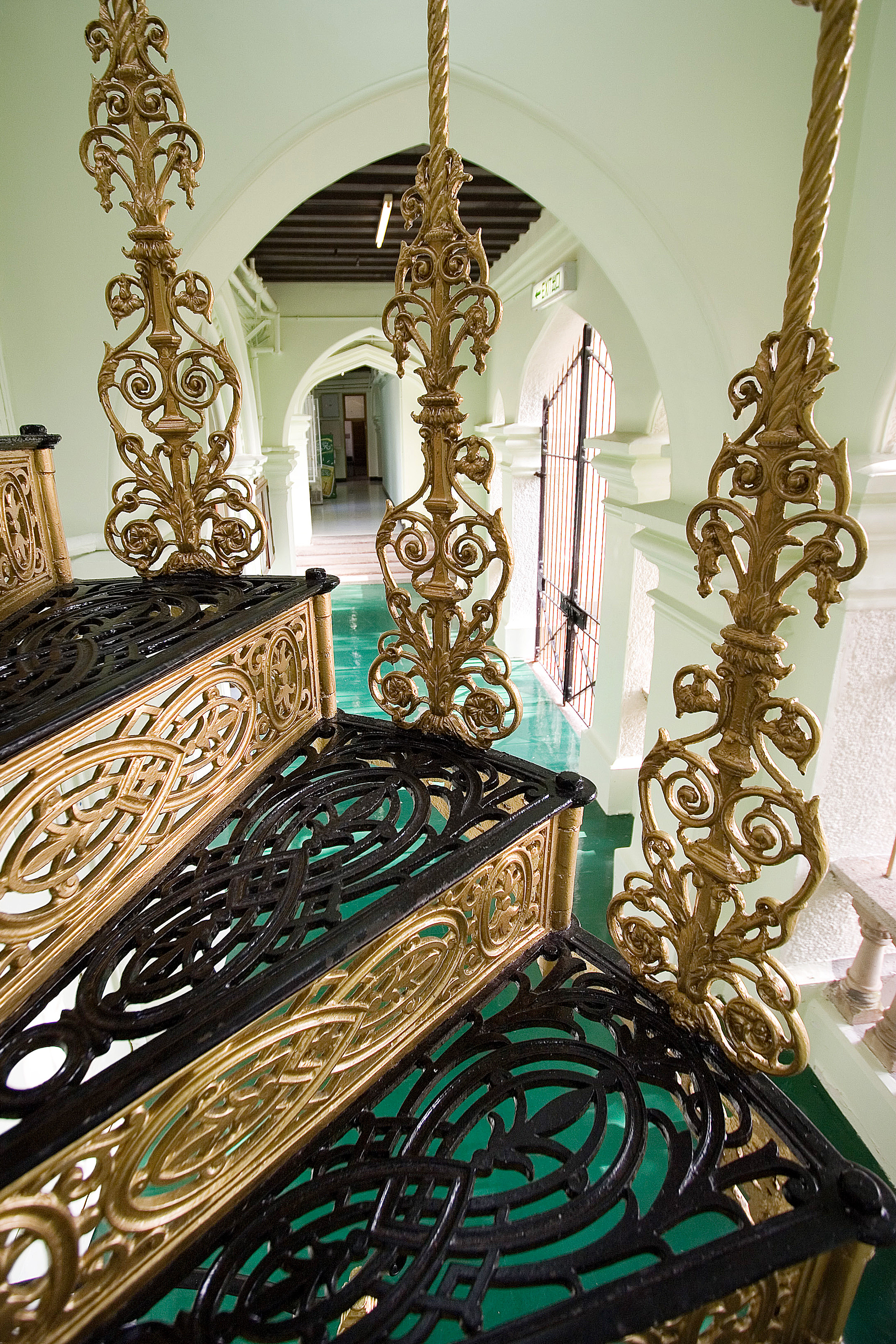 是一座屬於香港大學的古老建築物